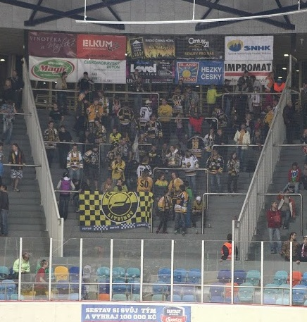 Sektor hosté